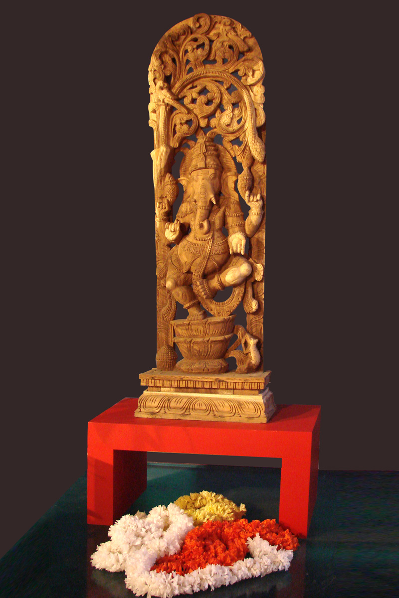 Le dimanche 31 août 2008 aura lieu la 13ème fête du Char de Ganesh à Paris. Ganesha est la divinité hindoue qui ouvre l'accès aux sphères supérieures. Ganesha est le destructeur des obstacles et le dispensateur des dons